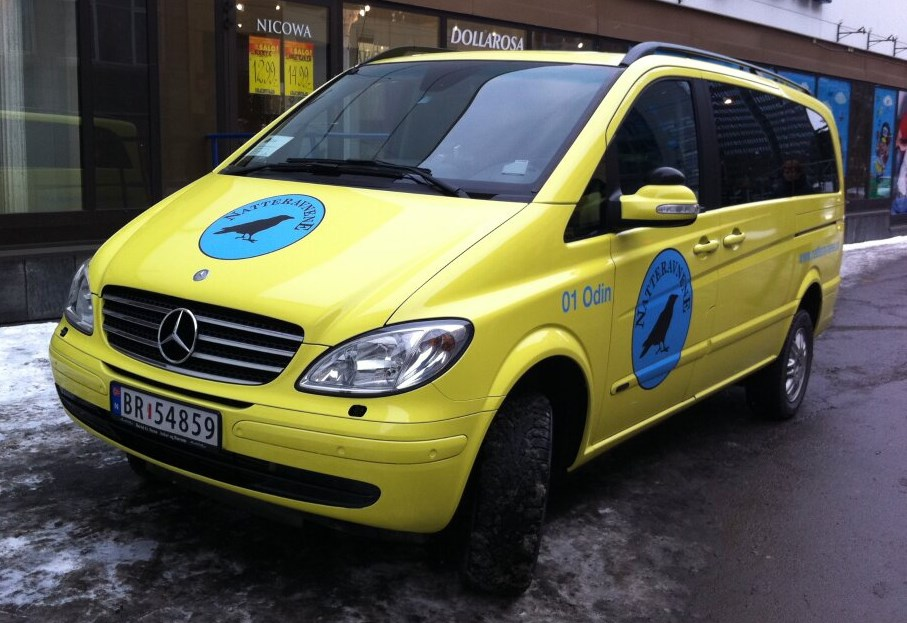 Odin er en av bilene til Natteravnene i Oslo.